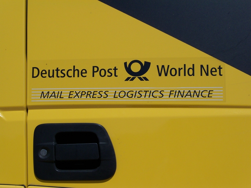 Logo de Deutsche Post World Net en un Trailer DHL España (IVECO 'Stralis' 450) en La Granadina, San Isidro de Albatera (Alicante, España).